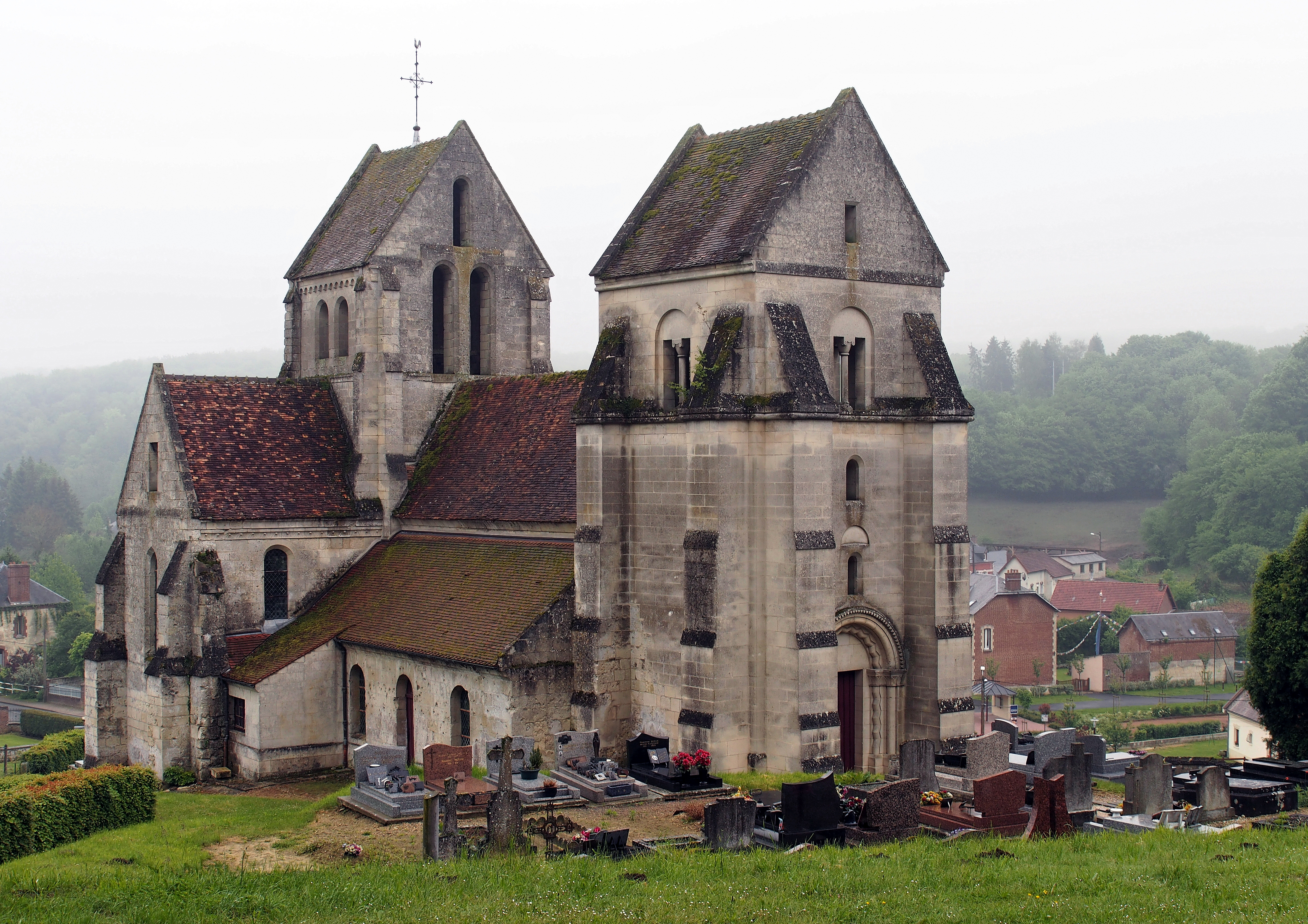 Église Notre-Dame de Septvaux, (Classé, 12 août 1909) .